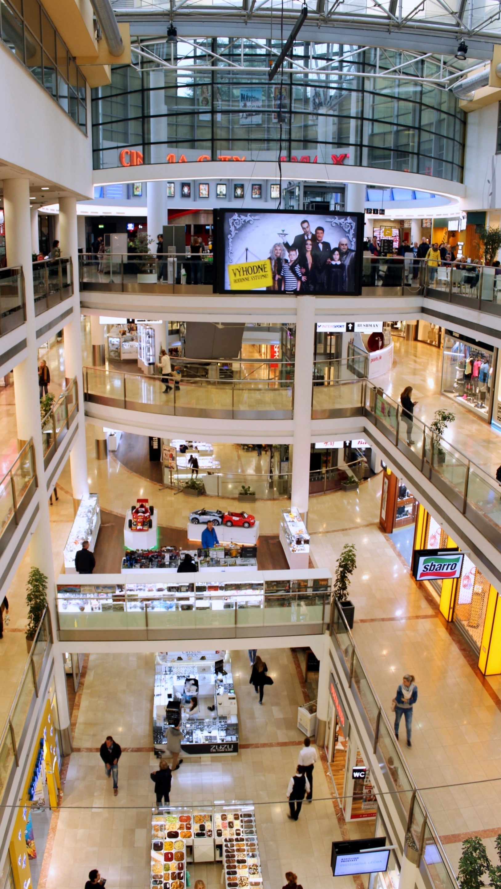 Palác Flora